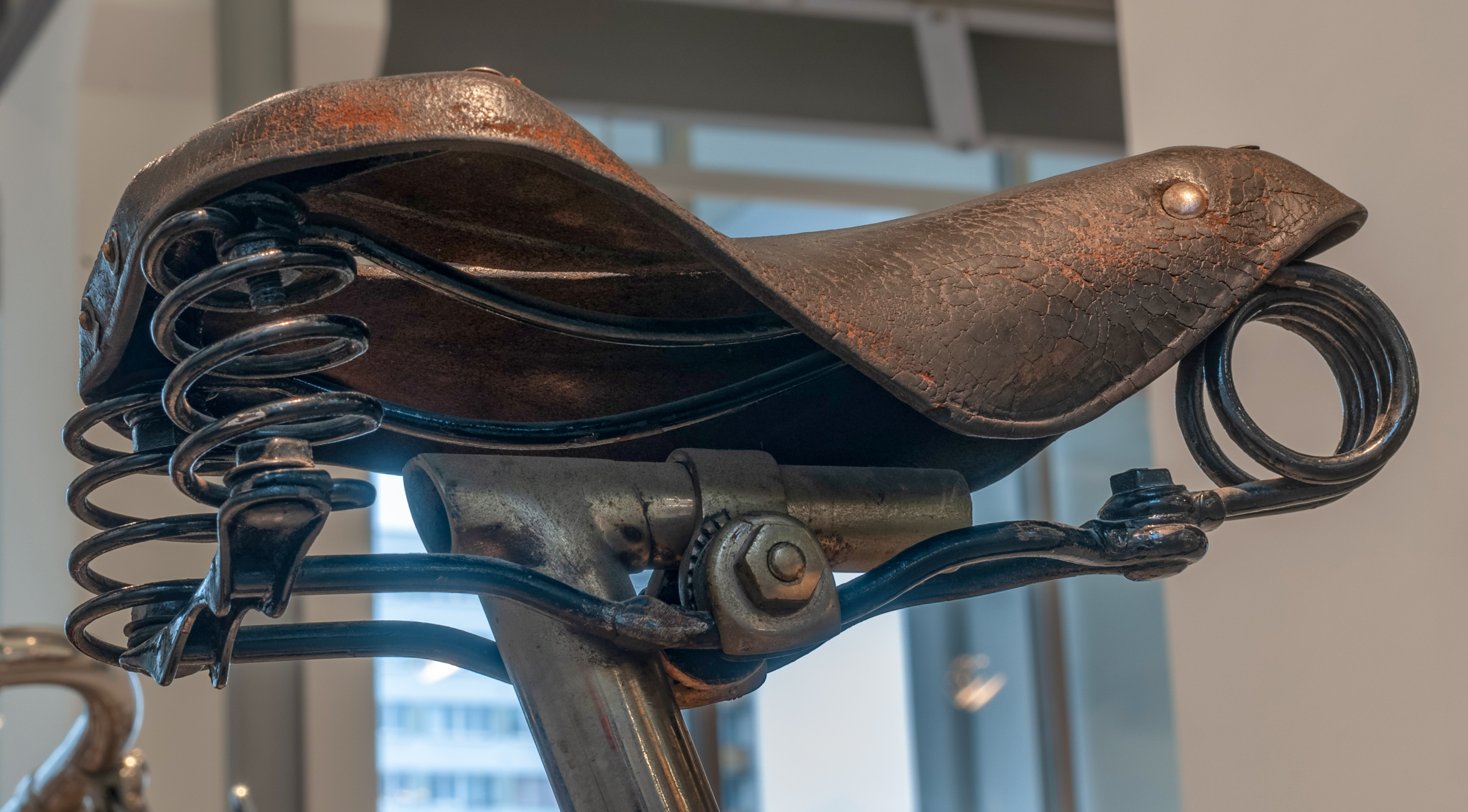 Fototermin Škoda Museum Mladá Boleslav 2013